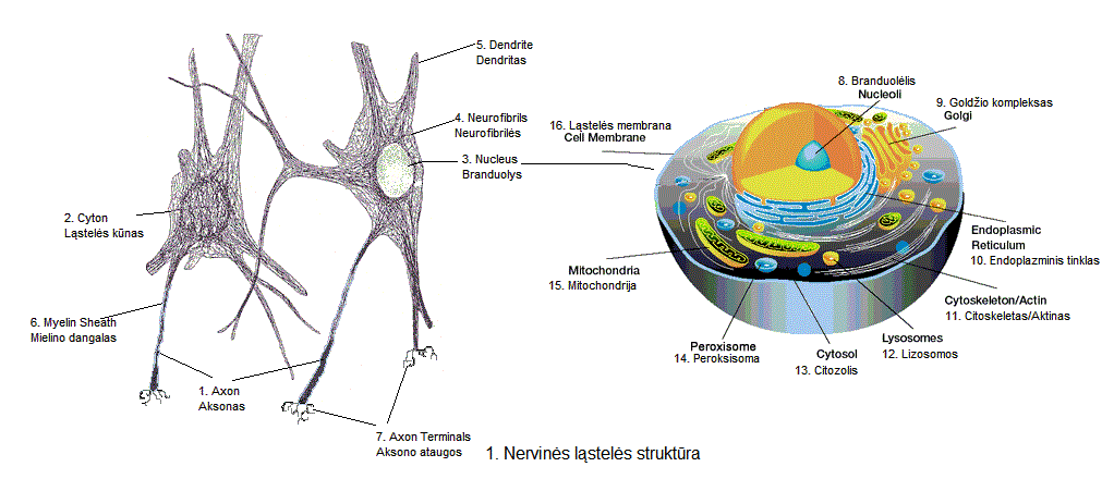 Nervinės ląstelės struktūra ir ląstelės branduolio dalys. Neuron cell structure. Nucleus.